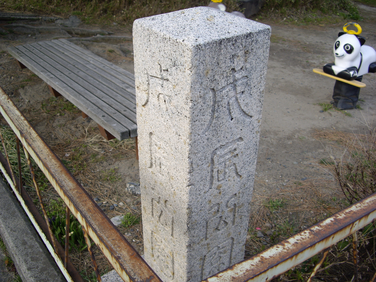 戊辰公園（新潟市）にある石碑。